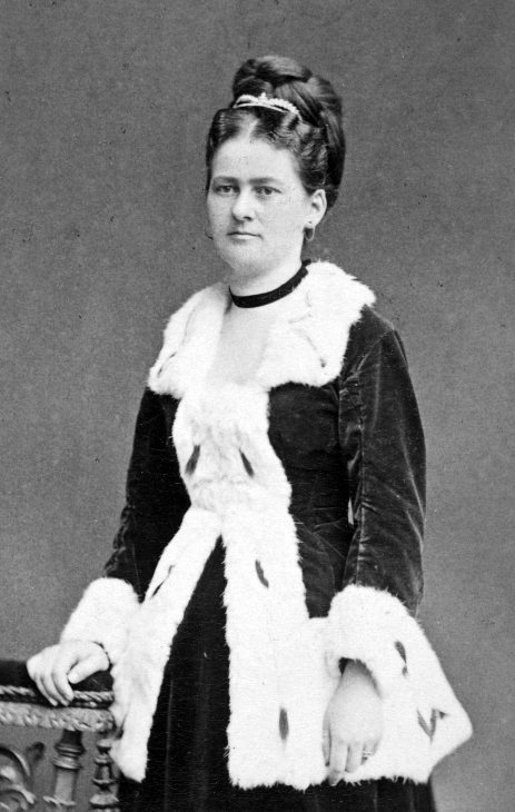 Photo portrait.